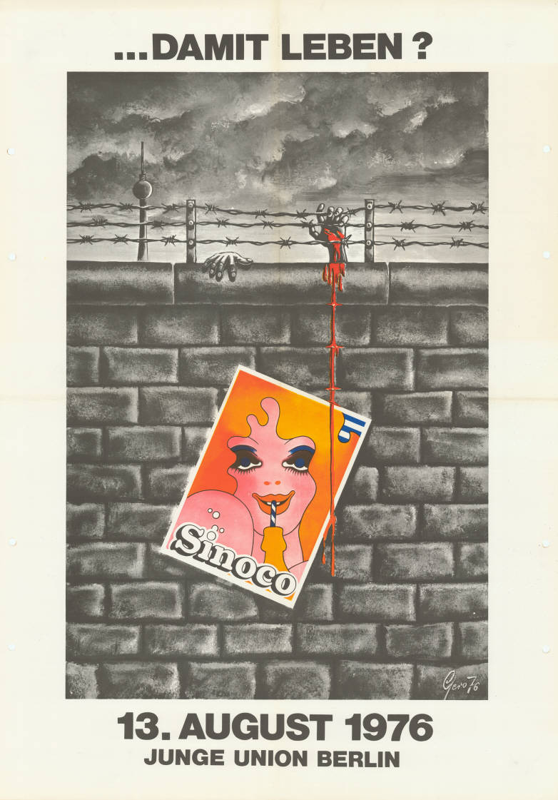 ... DAMIT LEBEN? Sinoco 13. August 1976 Junge Union Berlin Abbildung: Blutverschmiertes Kitschplakat klebt an Berliner Mauer. Vergeblich versuchen blutige Hände den Stacheldraht zu überwinden (Grafik) Plakatart: Motiv-/Textplakat Künstler_Grafiker: Gero Hilliger Auftraggeber: Junge Union Berlin Objekt-Signatur: 10-028 : 310 Bestand: Plakate von Jugendorganisationen der Parteien ( 10-028) GliederungBestand10-18: Plakate von Jugendorganisationen der Parteien (10-028) » CDU » Motiv- und Textplakate Lizenz: KAS/ACDP 10-028 : 310 CC-BY-SA 3.0 DE